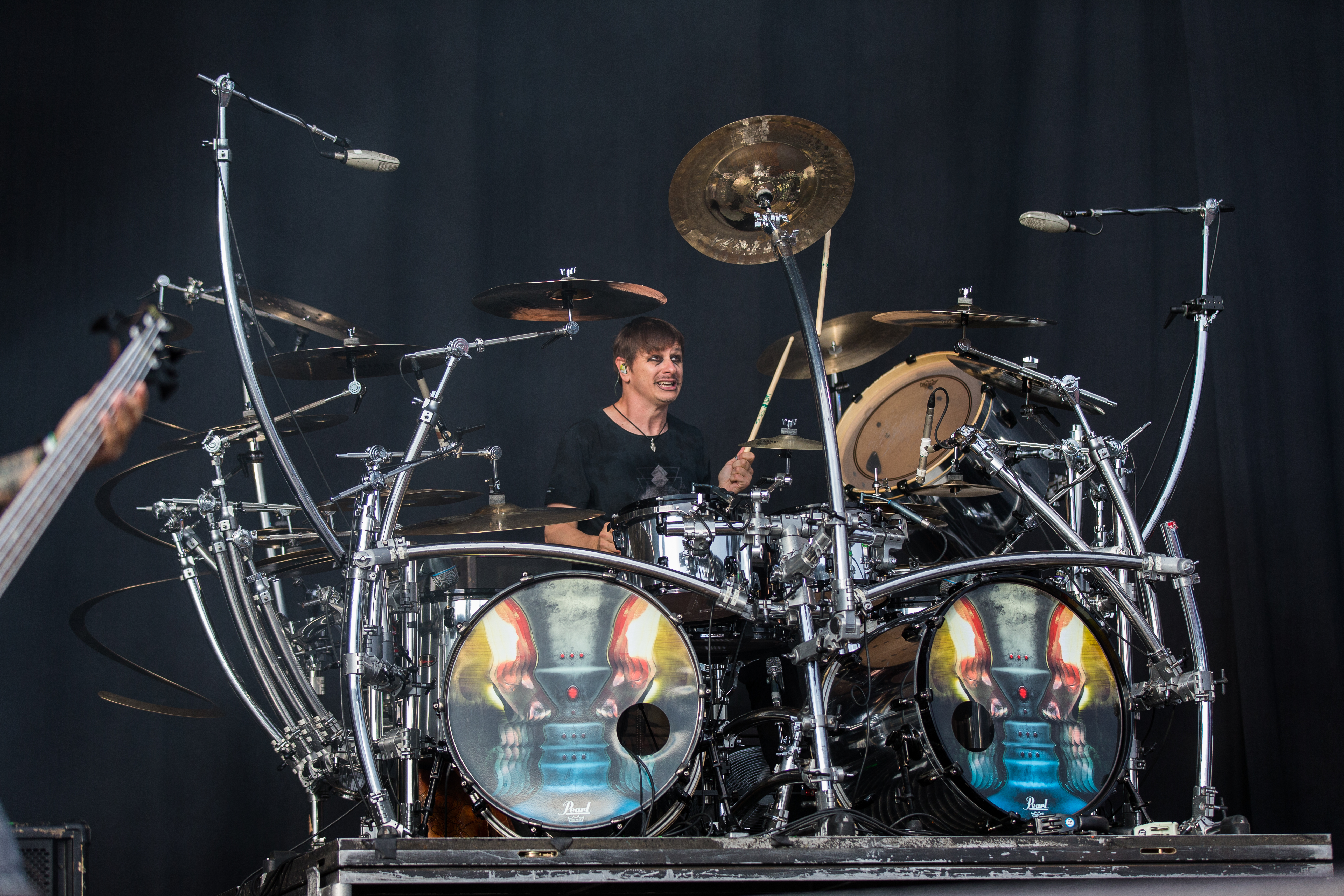 Rock'n'Heim Rock Festival Hockenheim August 2014